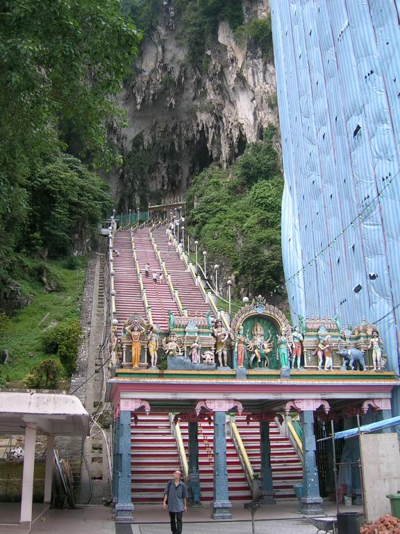 Kuala Lumpur, Malaysia (Author: Winey)